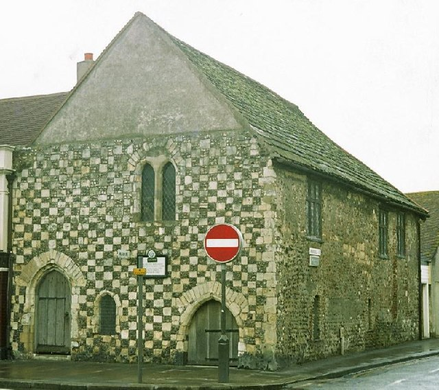 Marlipins